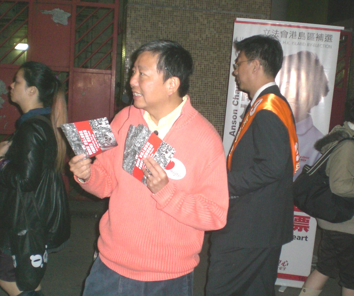 李卓人, Lee Cheuk Yan zh:2007年香港立法會港島選區補選 為陳方安生 Anson Chan 派單張